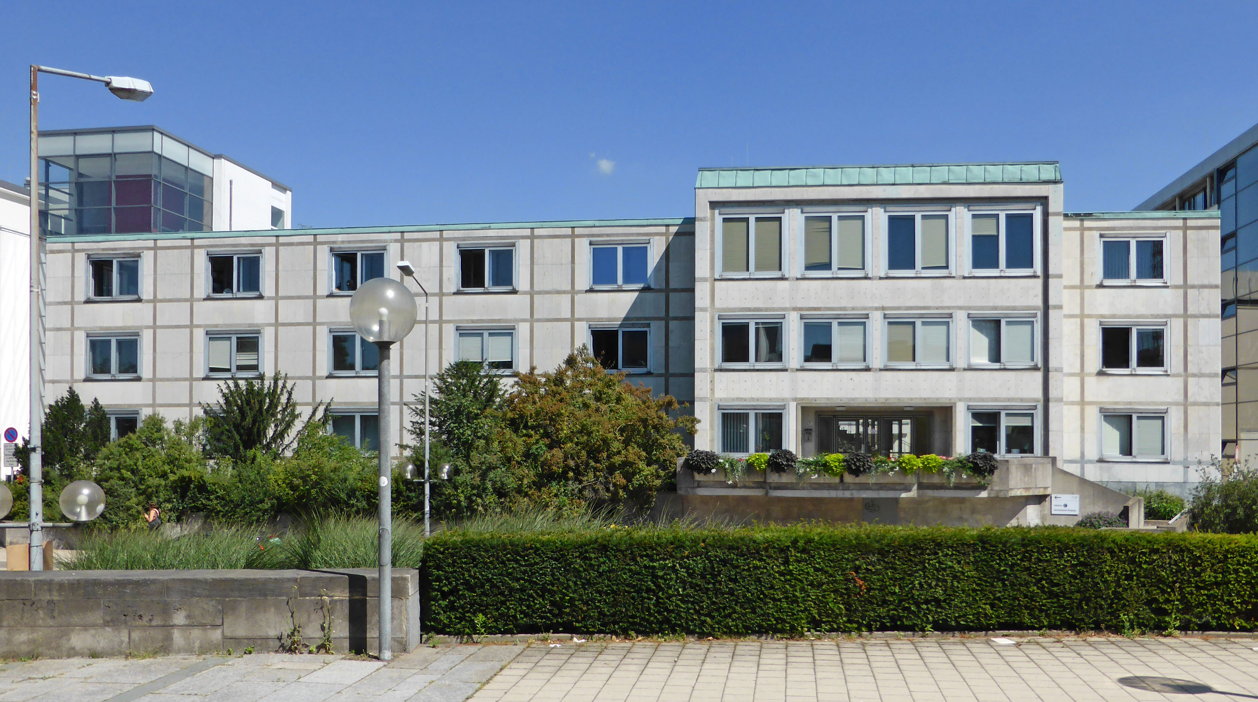 Ehemaliges Amtsgericht in Wolfsburg, heute als „Rathaus C“ genutzt.